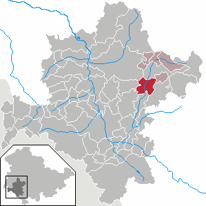 Viernau in Thuringia - District Schmalkalden-Meiningen